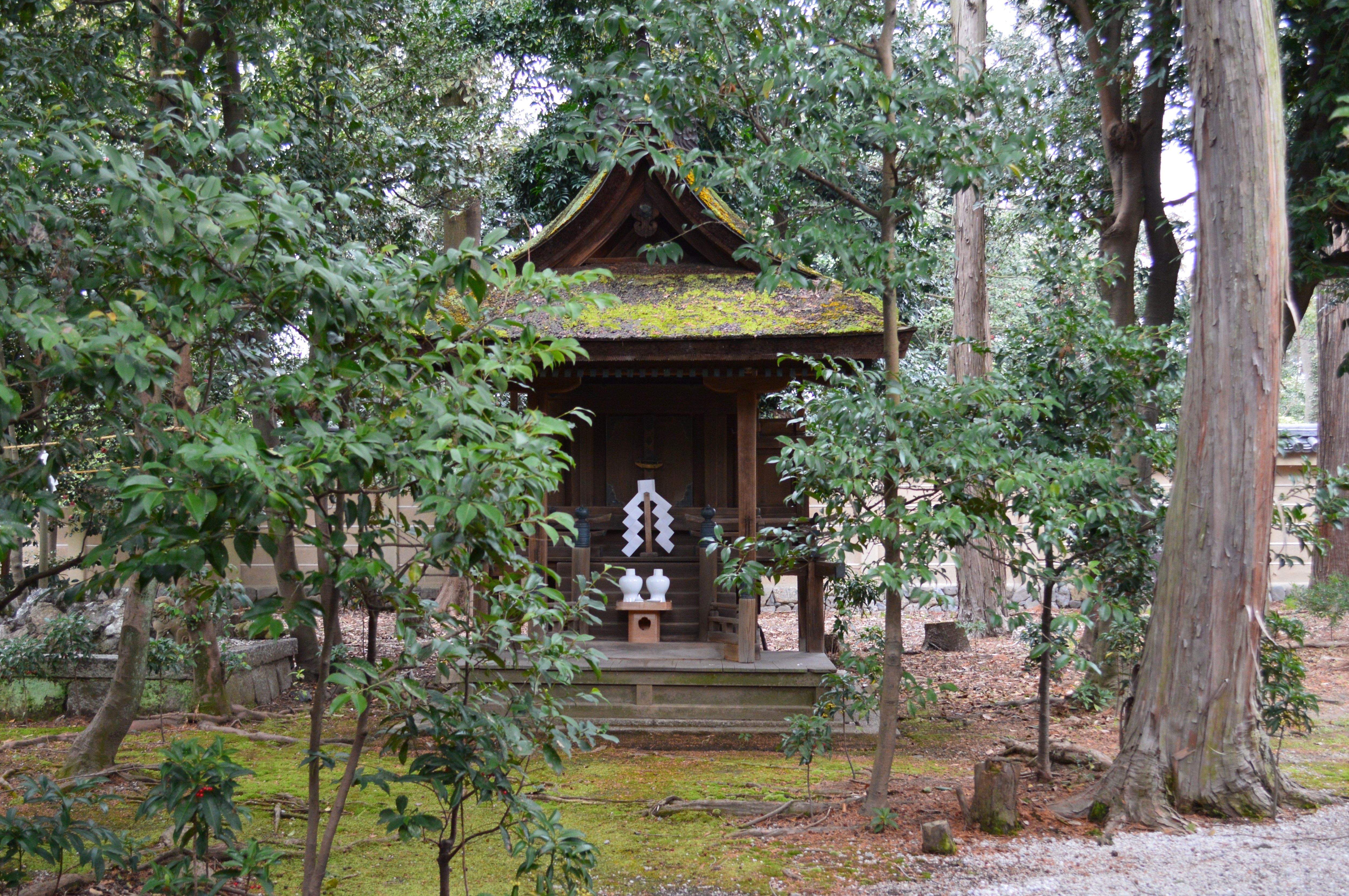 梅宮大社 護王社